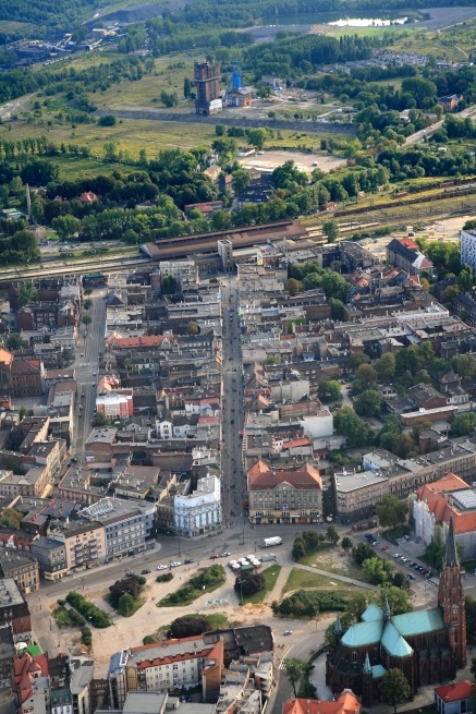 Bytom z lotu ptaka - ul. Dworcowa.